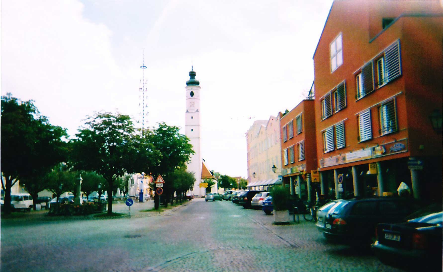 Der Marienplatz in Dorfen mit Marktkirche